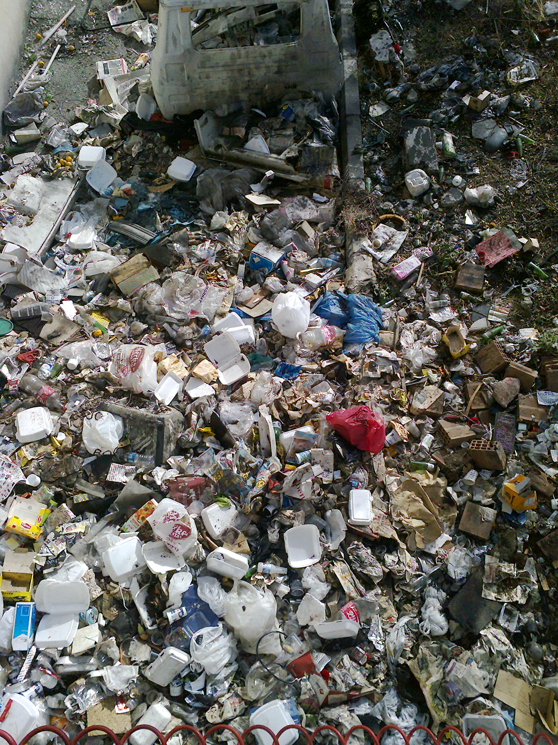 Çöp yığını